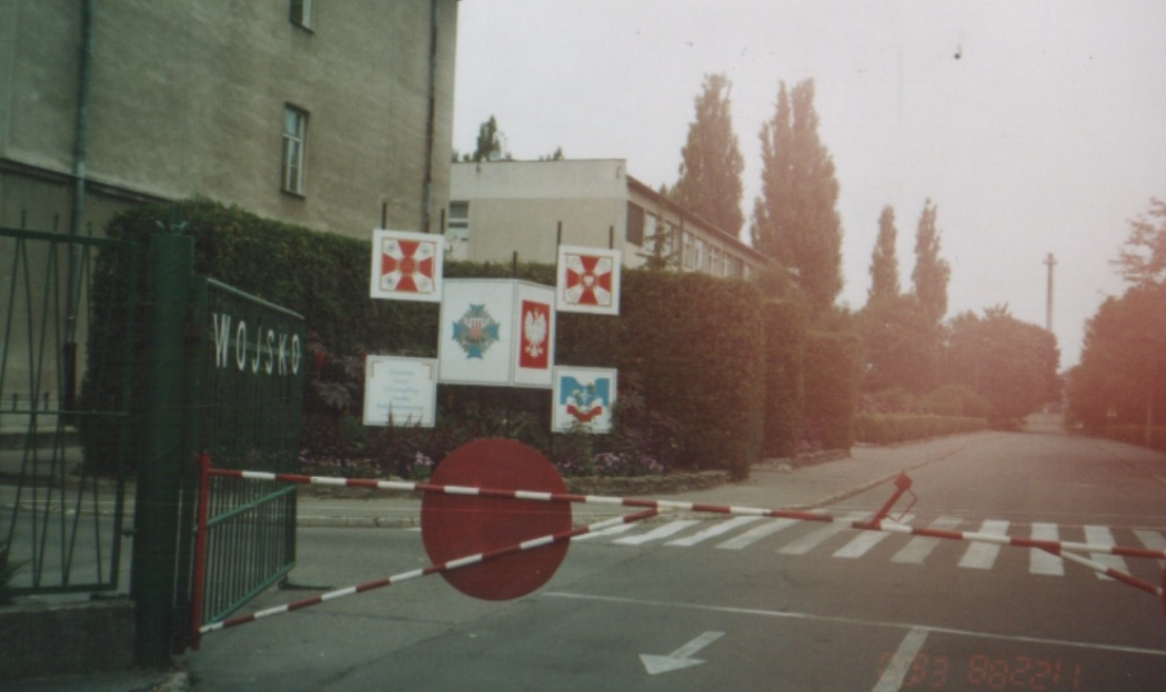 Garnizon Przasnysz, główne wejście do jednostek